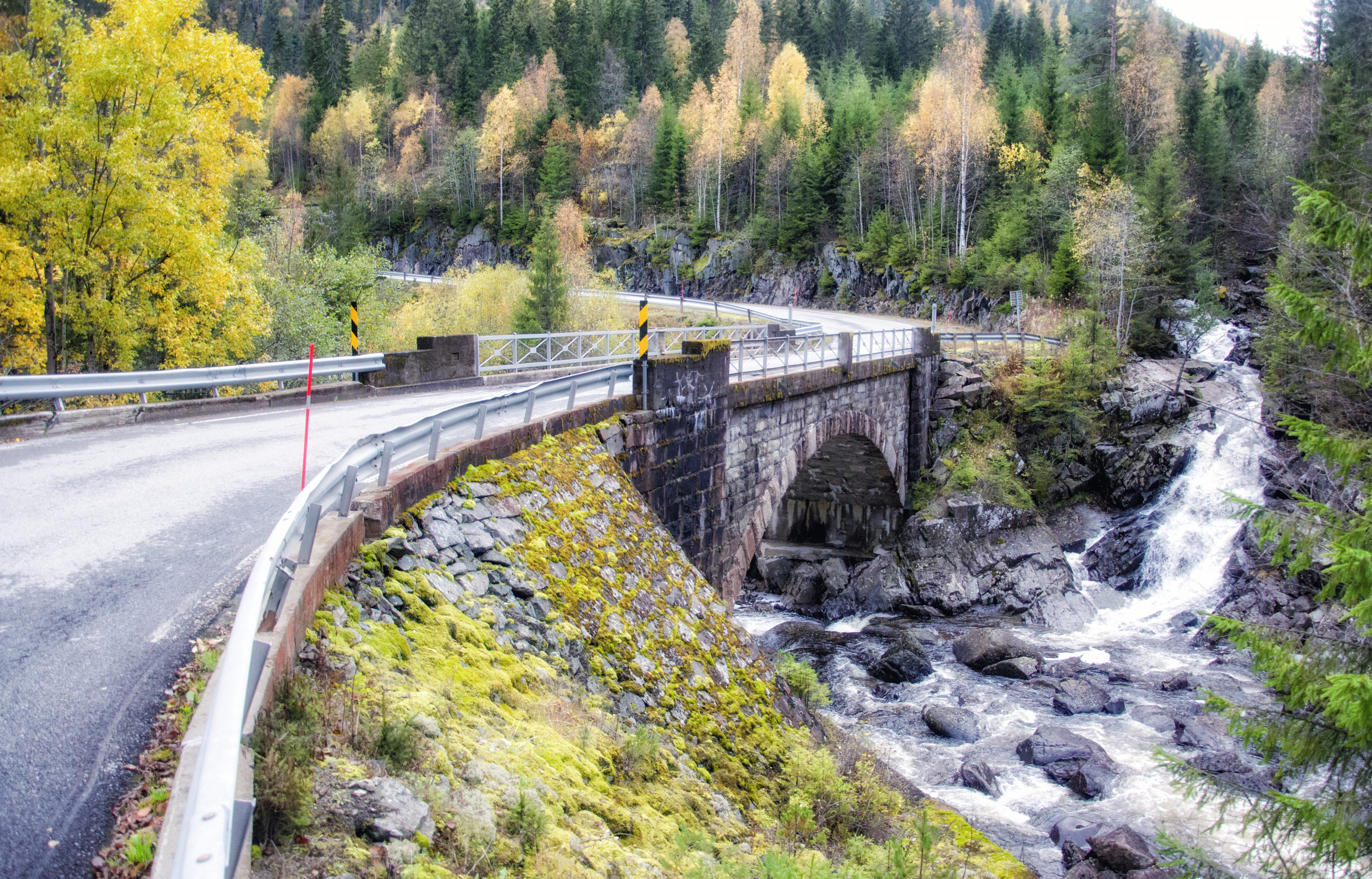 Bjørnflatin bru over Dalaåi, fylkesvei 452